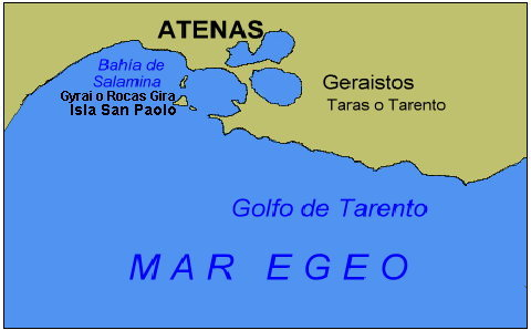 Rocas Gyrai.